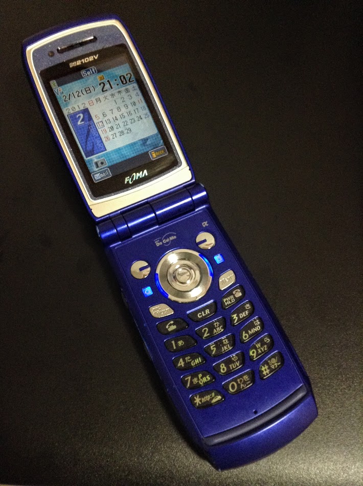 N2102V・ブルー